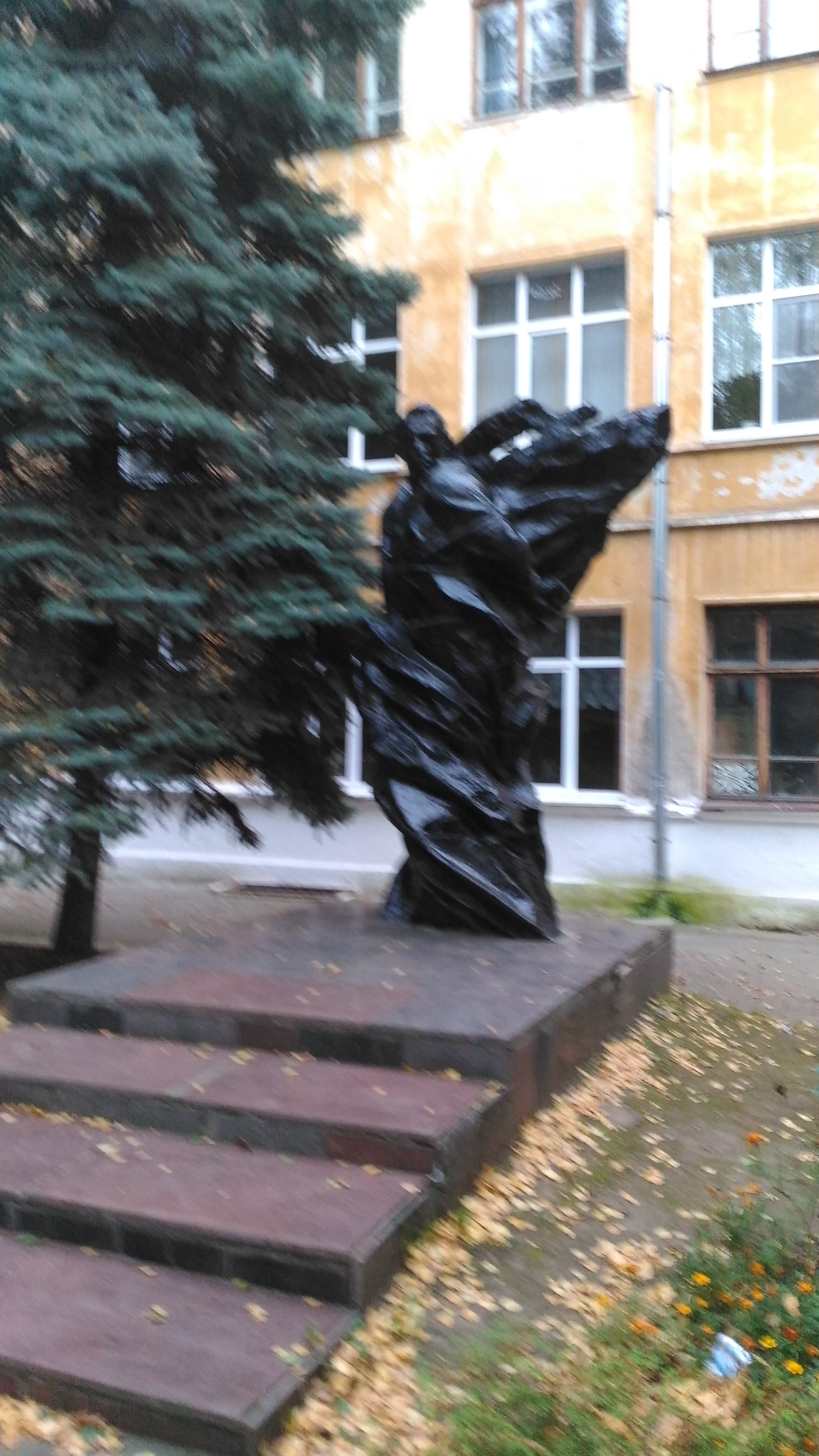 Нижний Новгород. Памятник Герою Советского Союза Е. А. Никонову